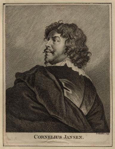 Portrait of Cornelis Janssens van Ceulen (1593-1661)